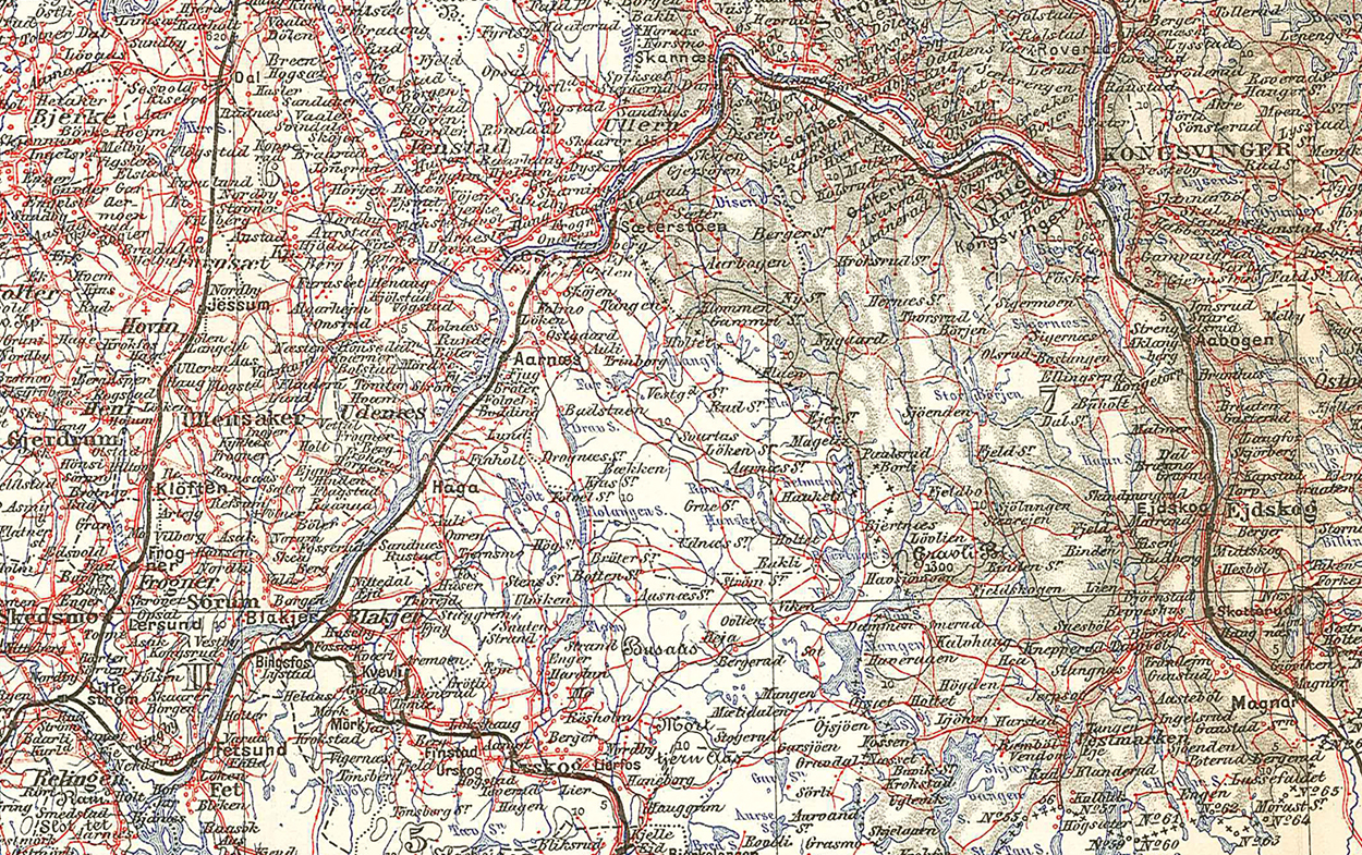 Kongsvingerbanen Lillestrøm-Kongsvinger.